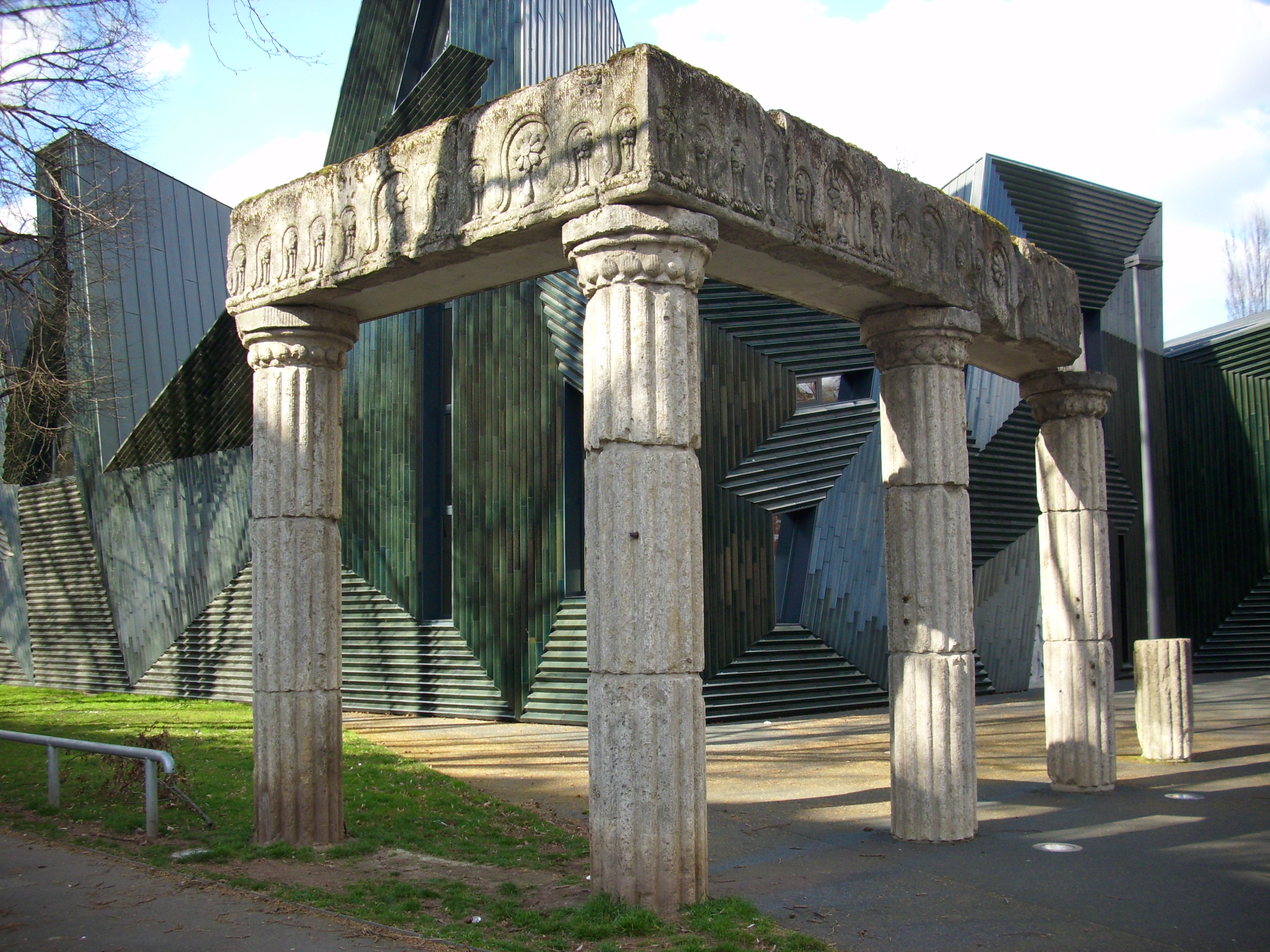 Fragmente der Vorhallenkolonnade der ehemaligen Hauptsynagoge, 1910–12, Architekt Willy Graf, Stuttgart, sowie Gedenktafel